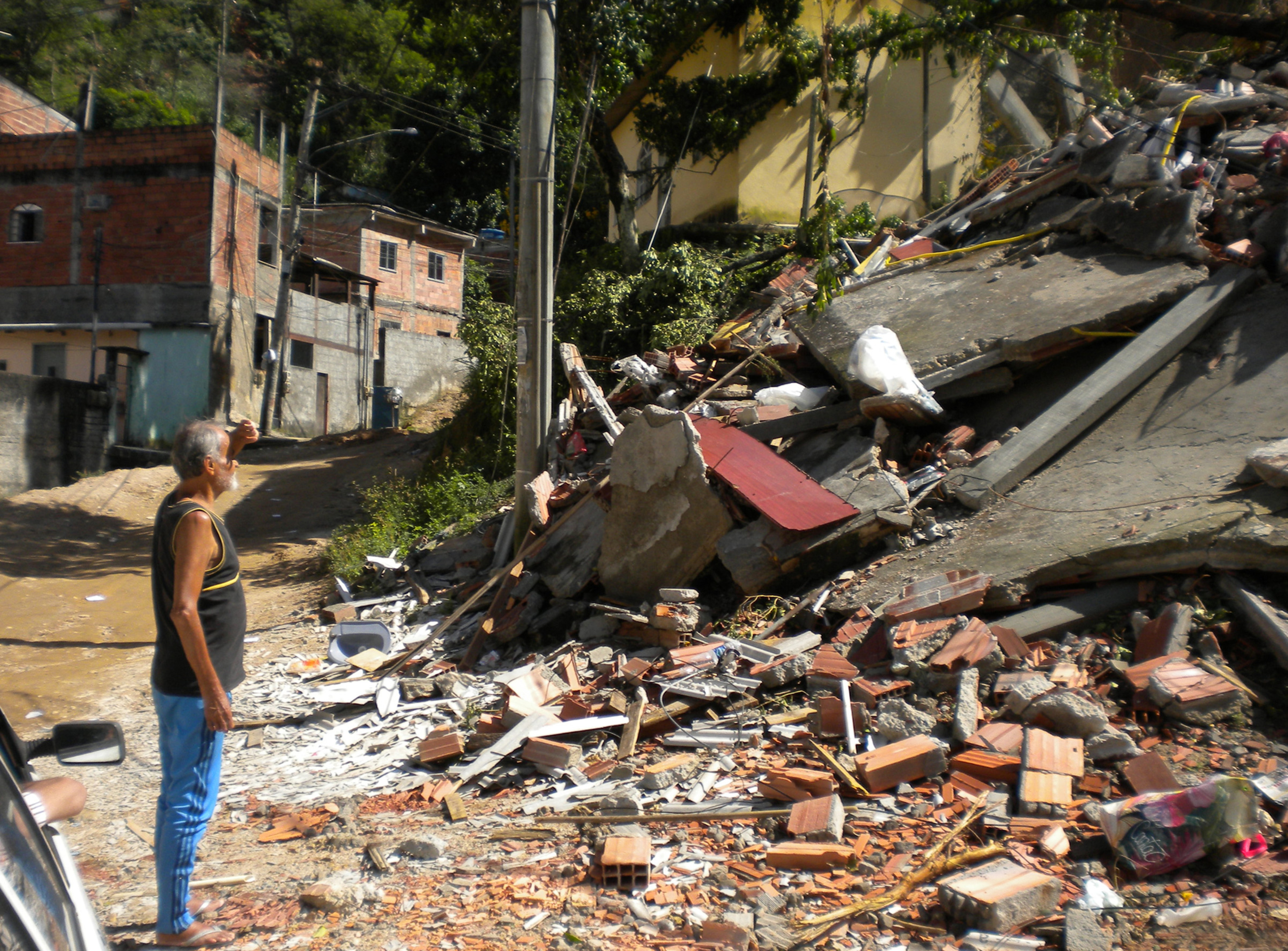 São Gonçalo (RJ) - Morador observa o que restou de sua casa depois de deslizamento, no bairro Novo México (Foto Repórter Vitor Abdala)